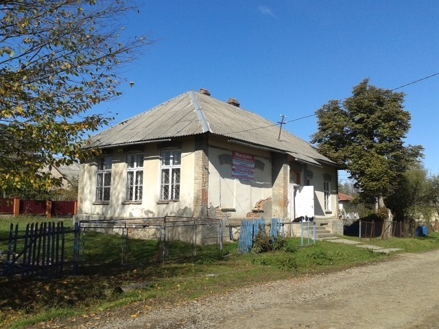 Будинок у Старому Угринові, де розташовувалась школа і одночасно мешкали вчителі